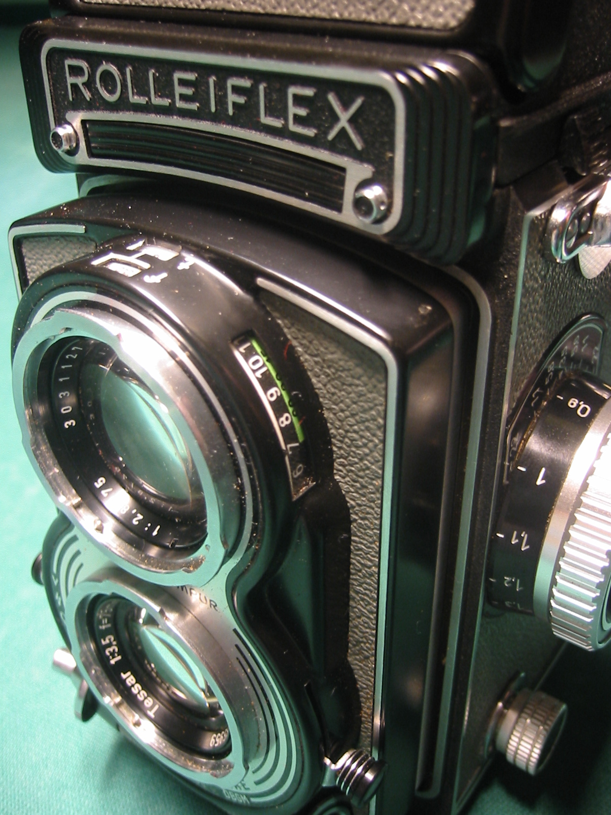 Rolleiflex